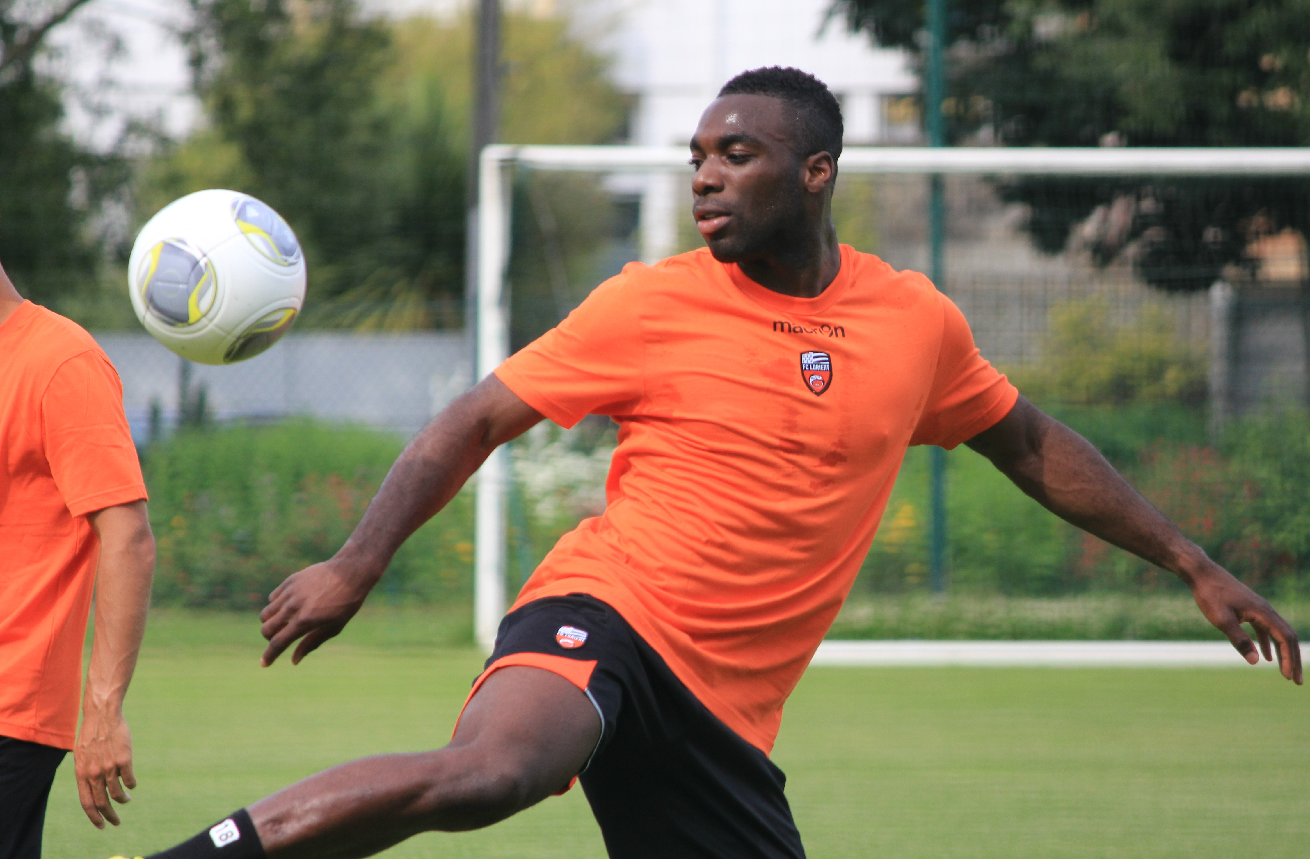 Gilles Sunu lors de la reprise de l'entrainement du FC Lorient le 27 juin 2013